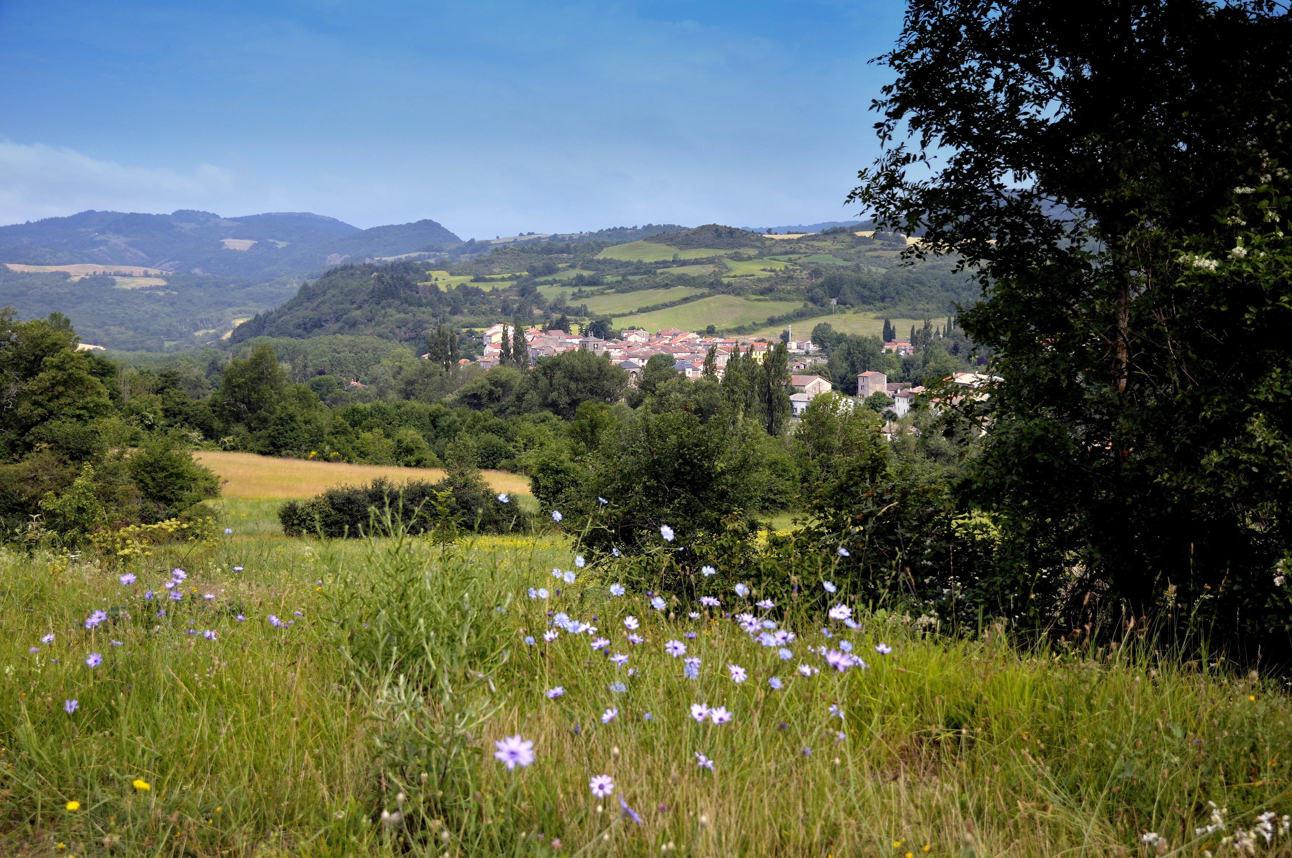 le village de Ceilhes